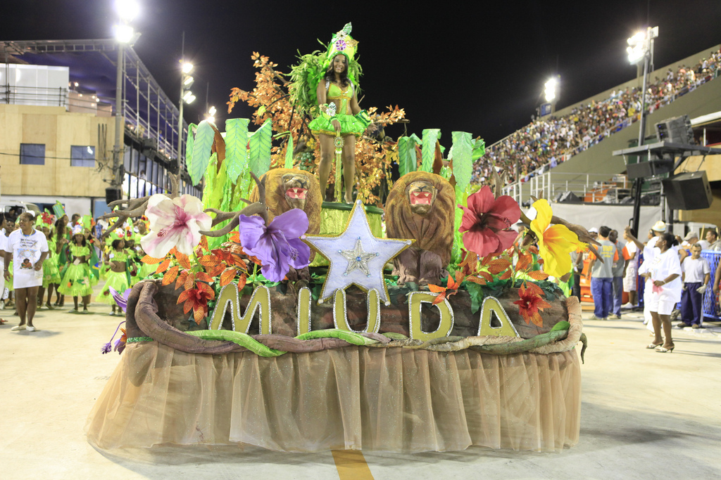 Rio de Janeiro - Pequenos sambistas fecham desfiles na Marquês de Sapucaí.